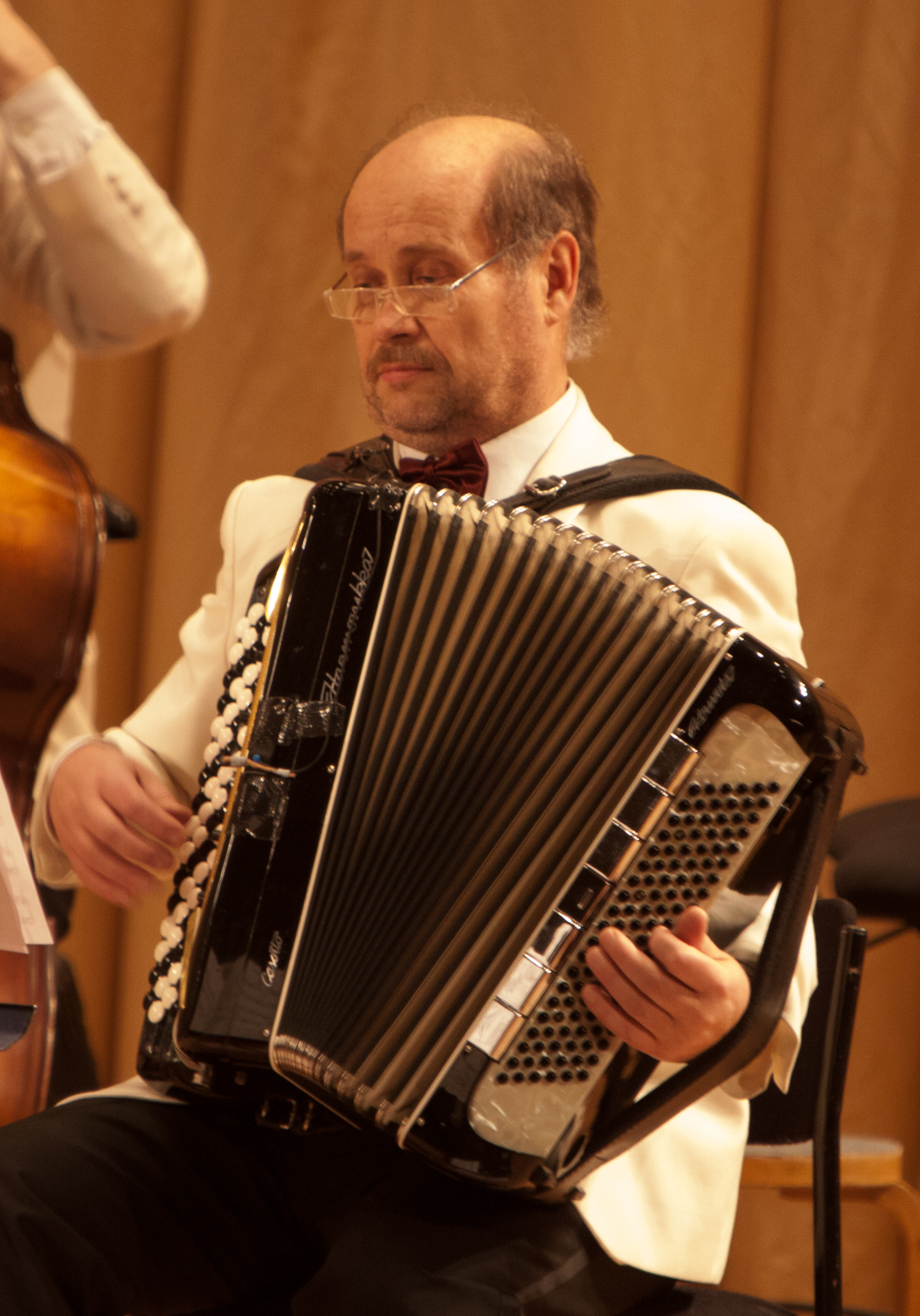 Ari Hakulinen suomalainen haitaristi